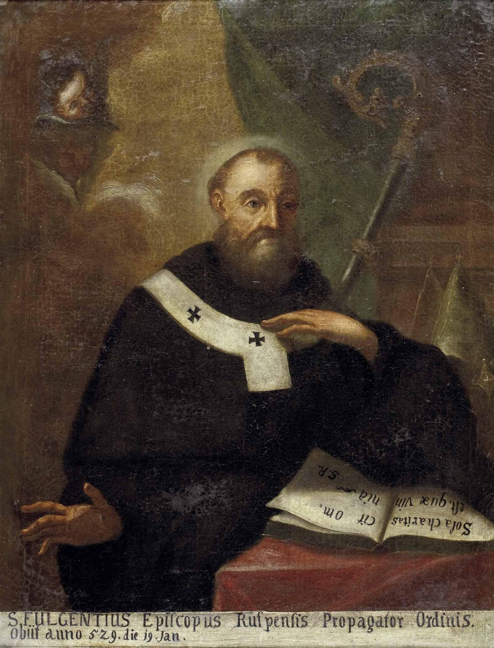 "Der Hl. Fulgentius von Ruspe (468 - 532 Sardinien), Bischof von Ruspe bei Karthago mit Pallium und Buch" (mit Inschrift: Sola Charitas est, quae vincit omnia, Nur die Liebe ist es, die alles besiegt; unten beschriftet: S. Fulgentius Episcopus Rufpensis Propagator Ordinis obiit anno 529 die 19. Jan.), Öl auf Leinwand, ca. 102 x 80 cm